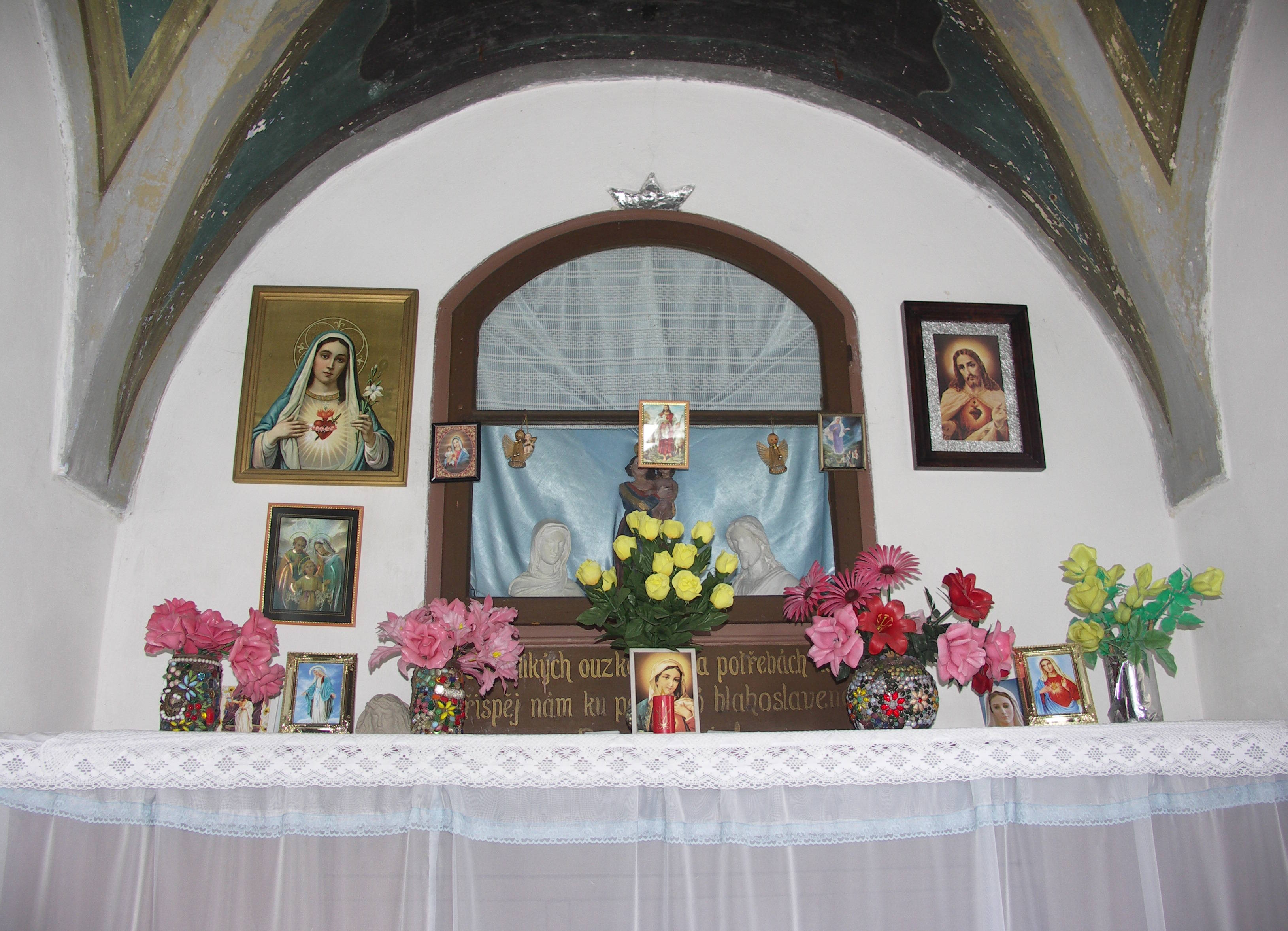 Kaplička Sejkorská (Bozkov), Cimbál, Bozkov, s oltářem Panny Marie Sedmibolestné.